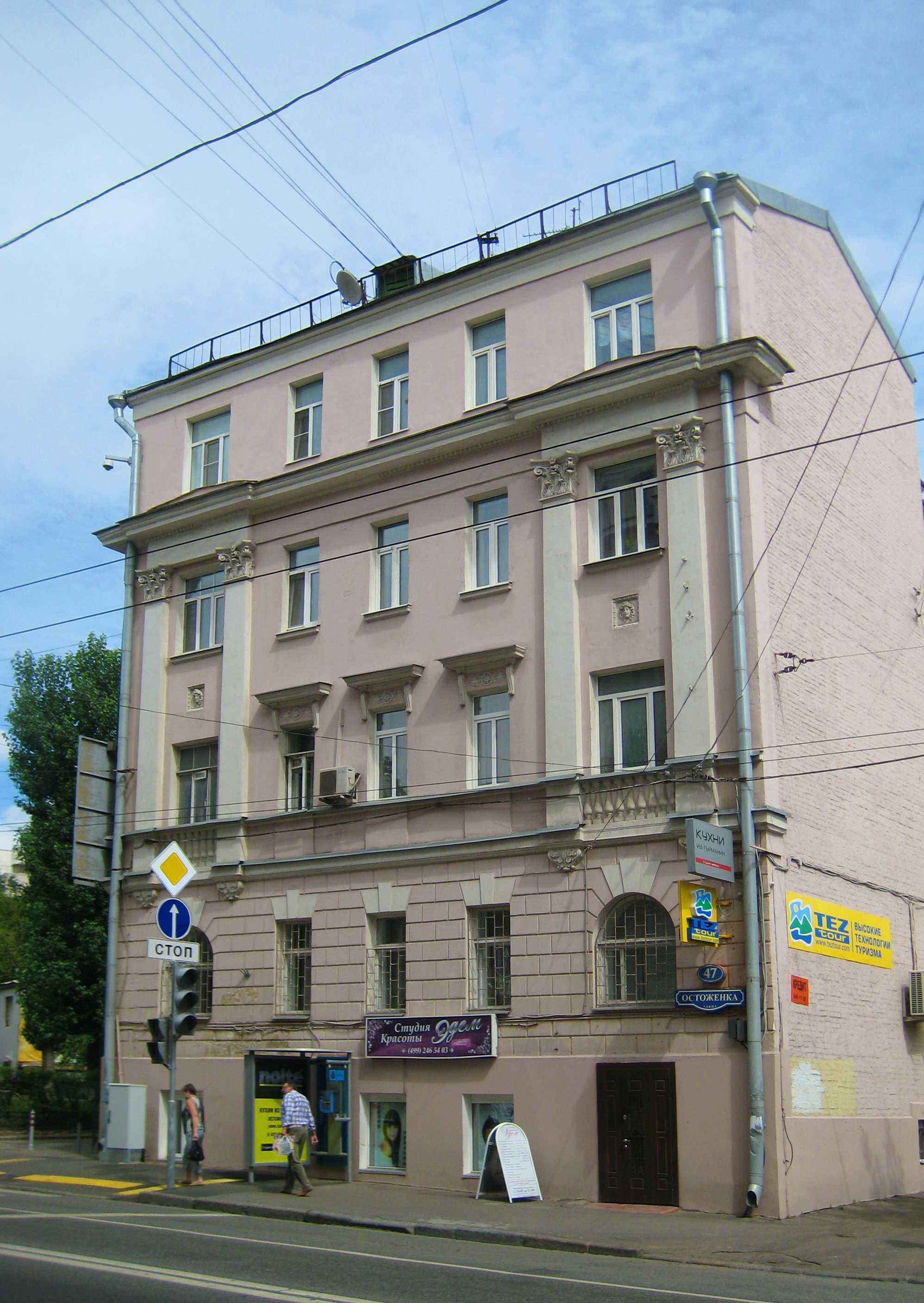 Остоженка 47 - Доходный дом причта Успенской церкви, 1914, арх. И. П. Машков. К сожалению, за несколько лет после этого фото фасад кусками обвалился.